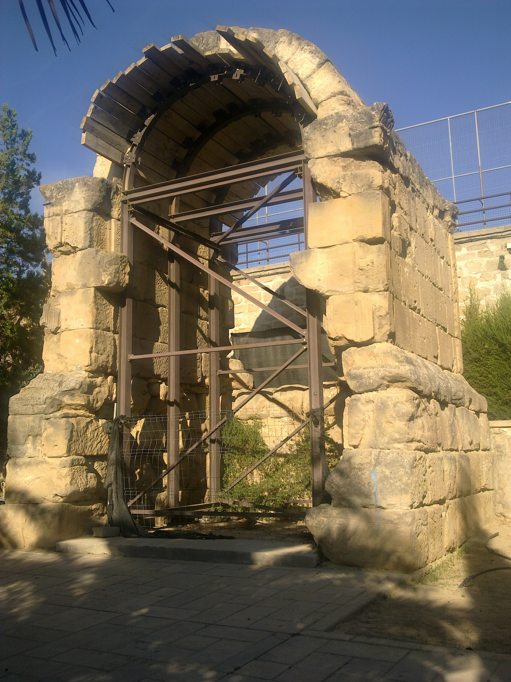 Mausoleu romà de Miralpeix Arquitectura funerària